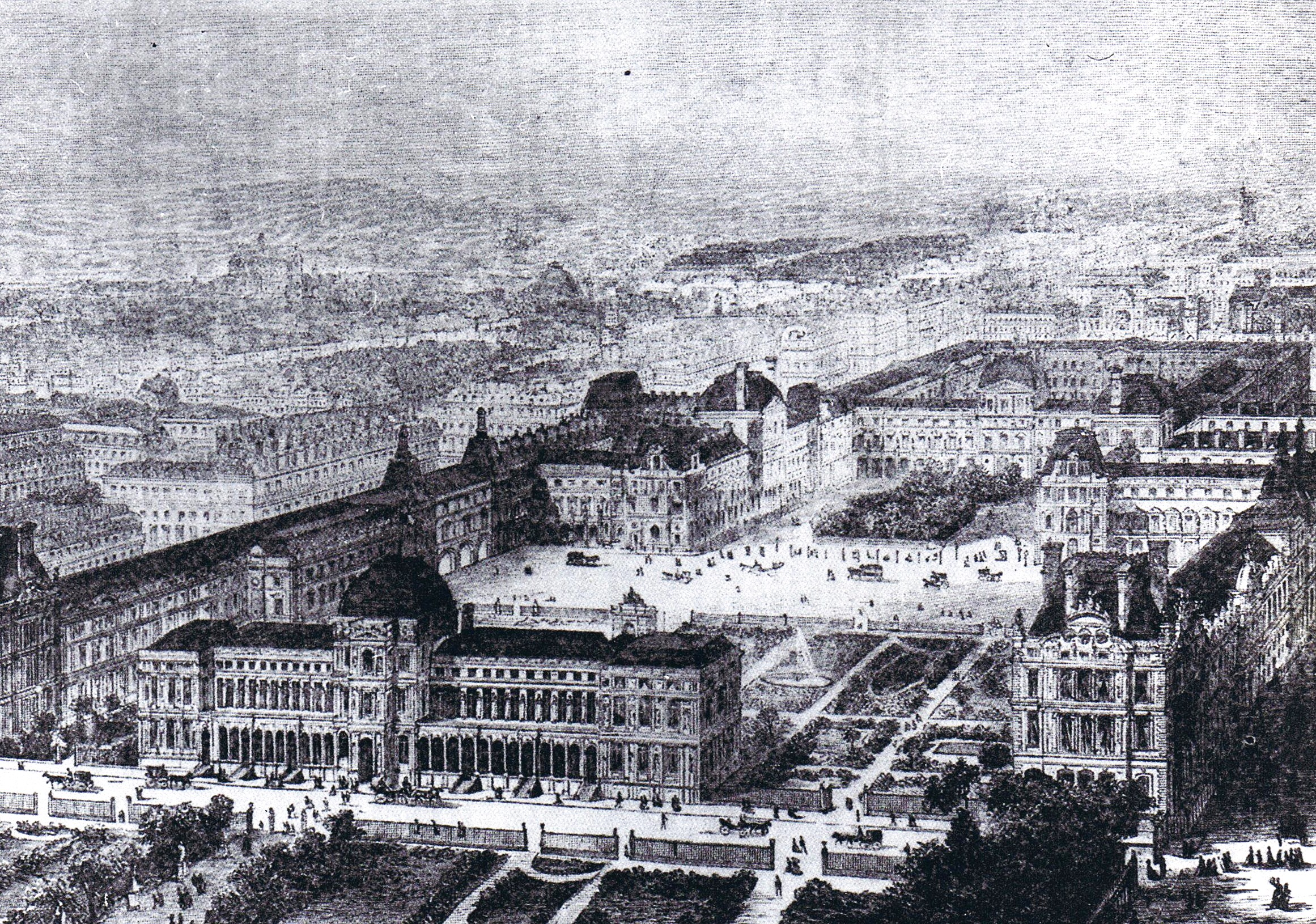 Projet de reconstruction des Tuileries soutenu par le gouvernement en 1877 et 1878.